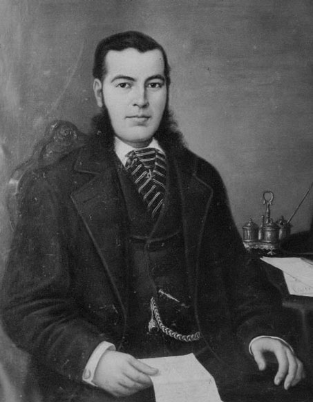 Antonio Pérez Cascales